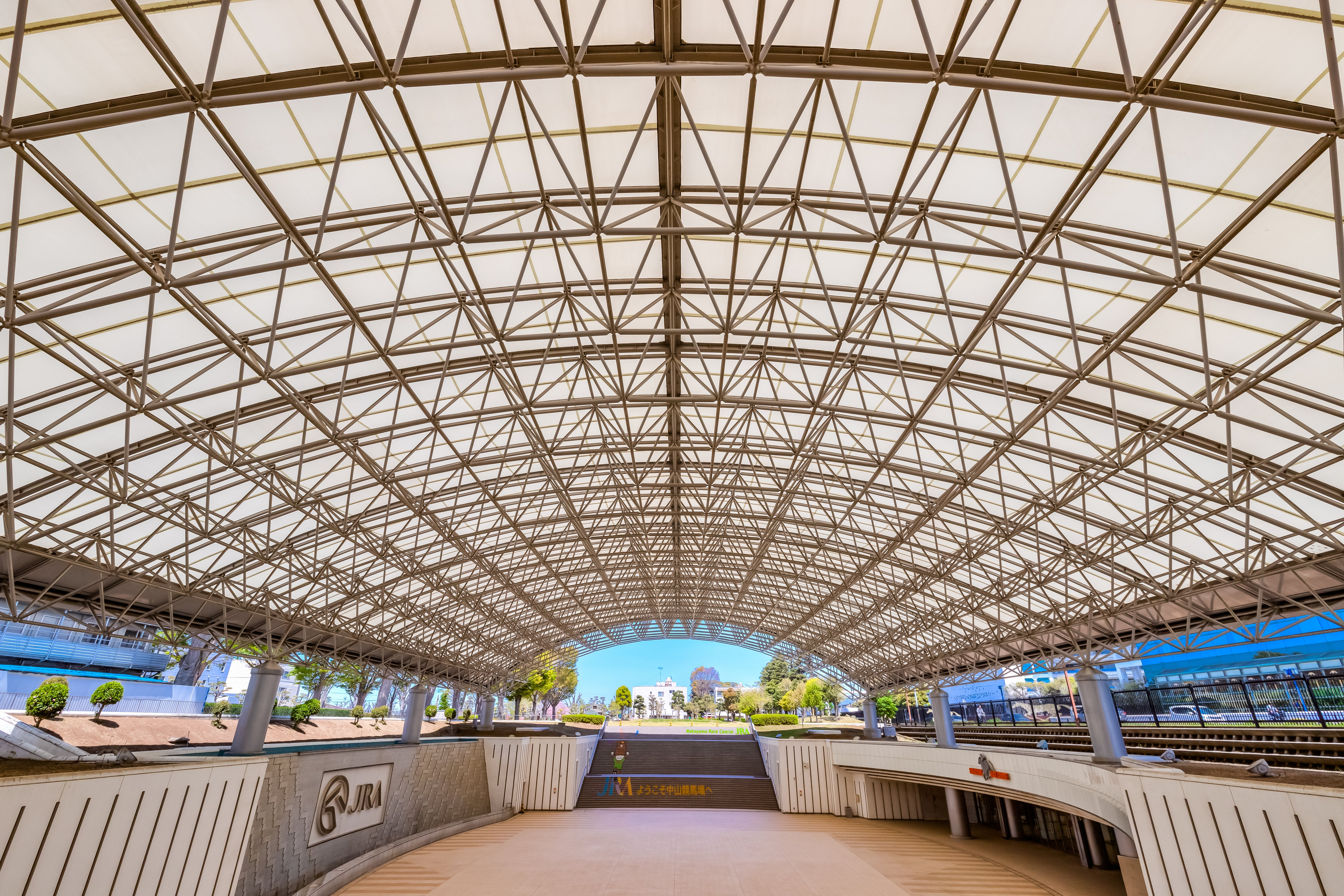 千葉県市川市、千葉県船橋市、中山競馬場、中央門